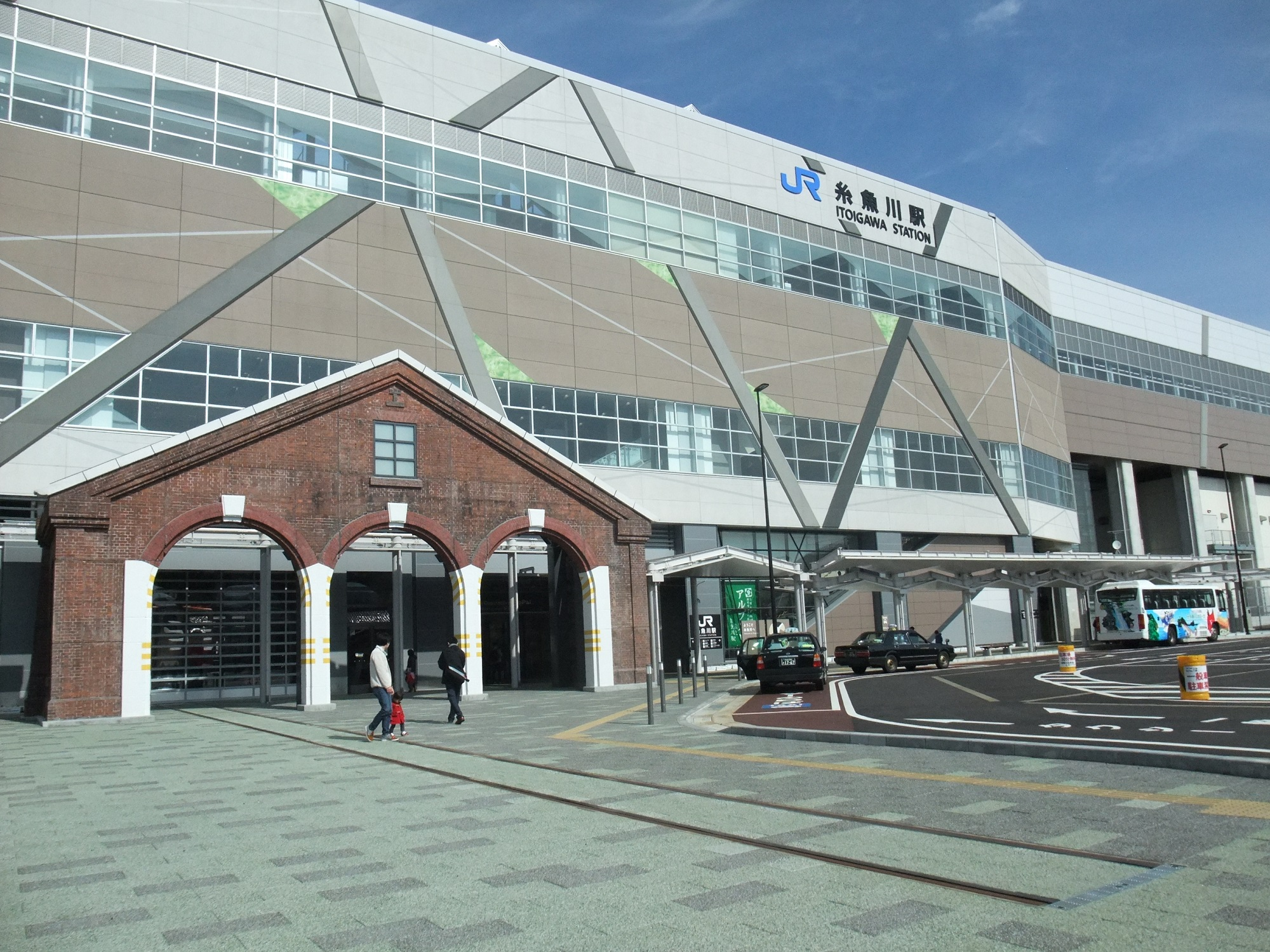 北陸本線糸魚川駅アルプス口